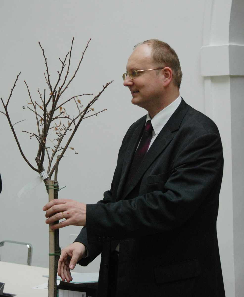 Poslanec Libor Ambrozek dostal od zástupců občanských iniciativ (Naše stromy) kromě petice i sazenici lípy.